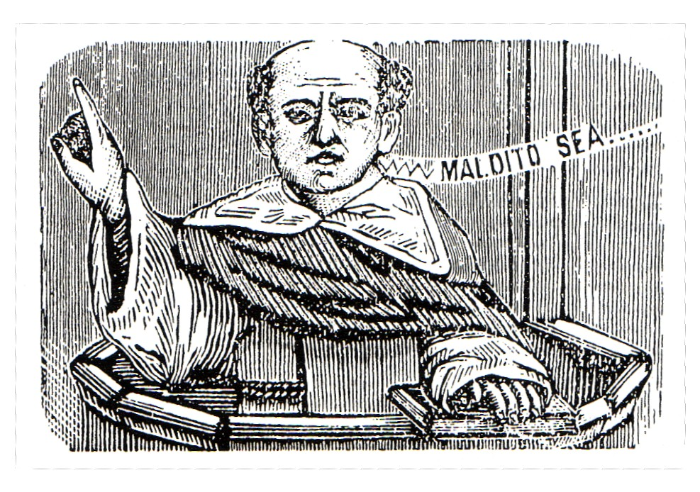 El Pare Francesc Mulet, en el moment del seu famós sermó davant el Papa. Il·lustració de la revista "El Pare Mulet", dirigida per Constantí Llombart.